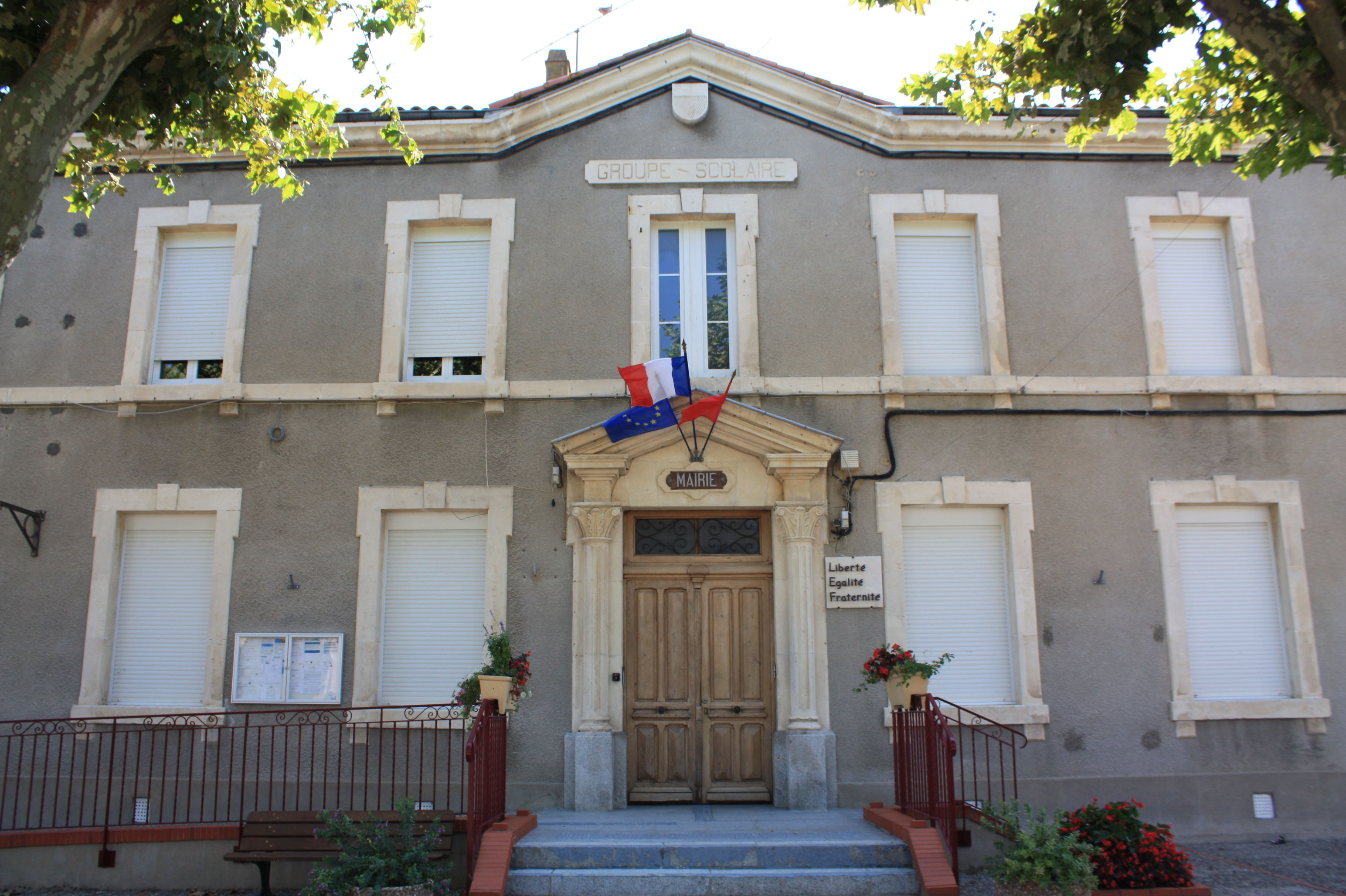 Mairie de Badens